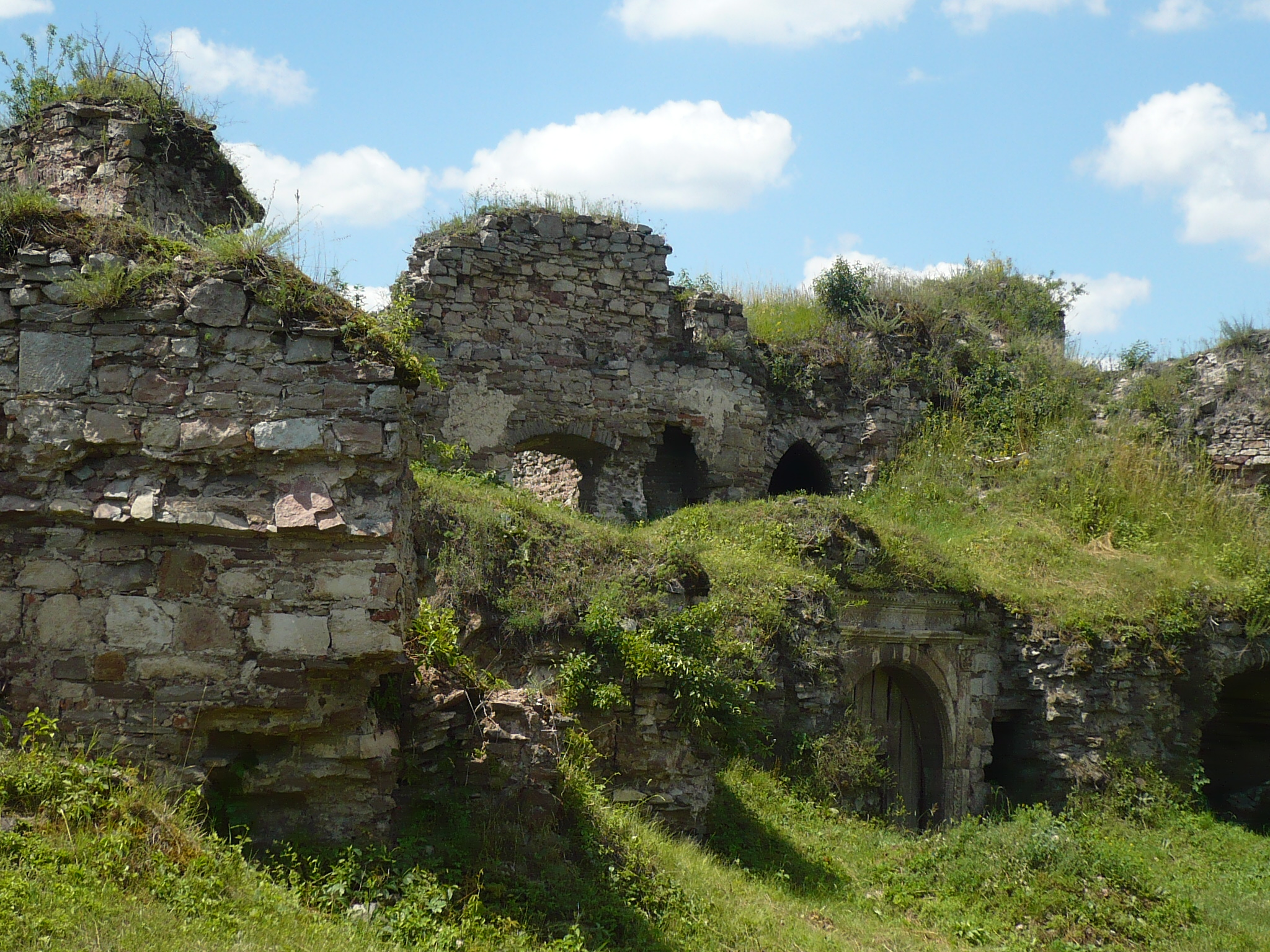 Jazłowiec. Zamek